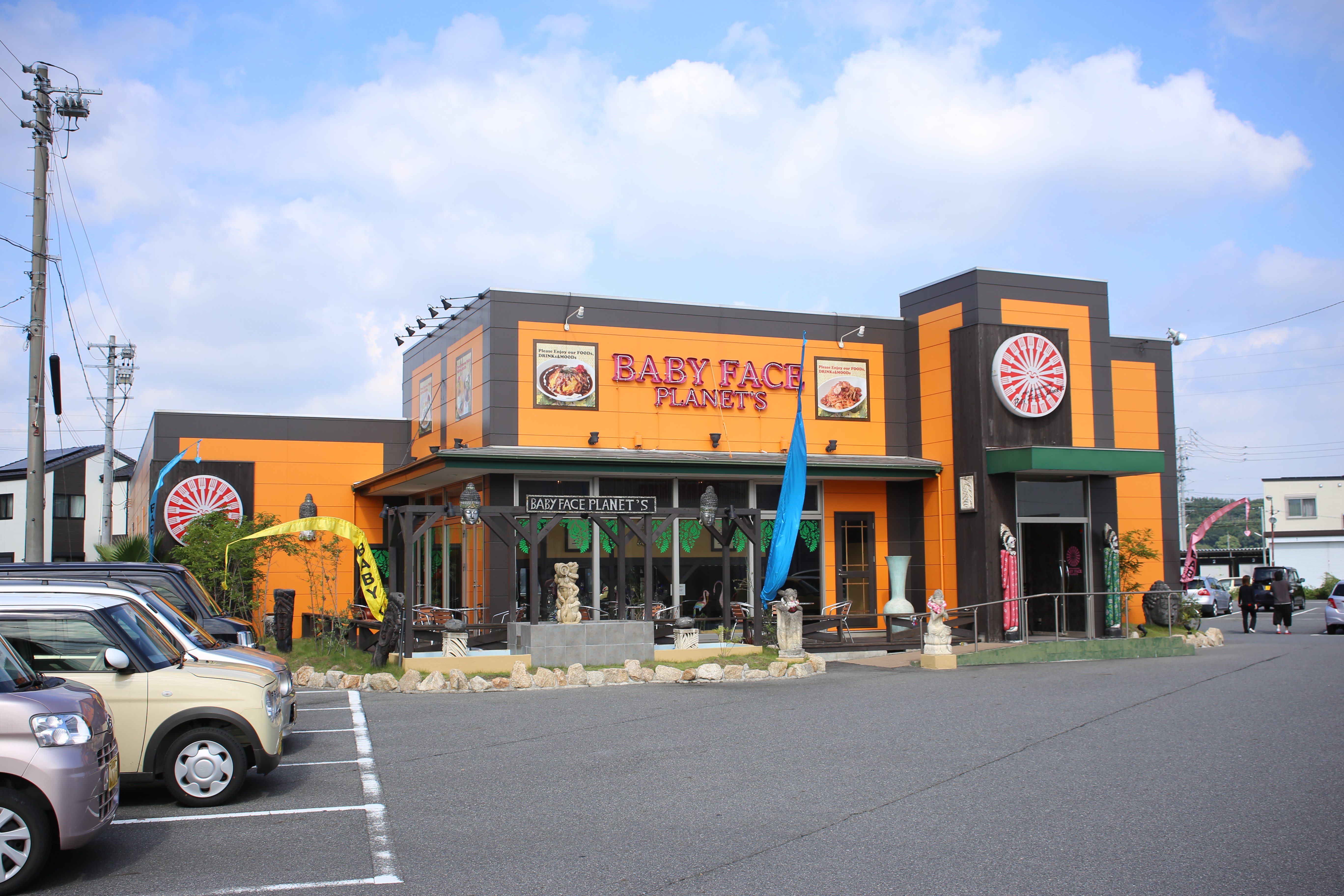 愛知県知多郡阿久比町植大のベビーフェイスプラネッツ阿久比店